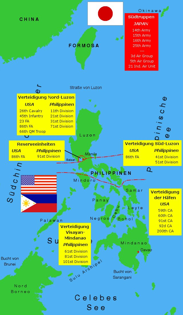 Gebiet der Philippinen mit Truppenstärken (Dezember 1941)